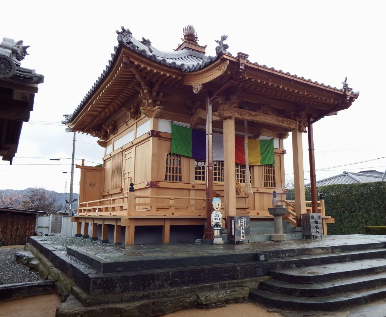 阿波国分寺の大師堂2014